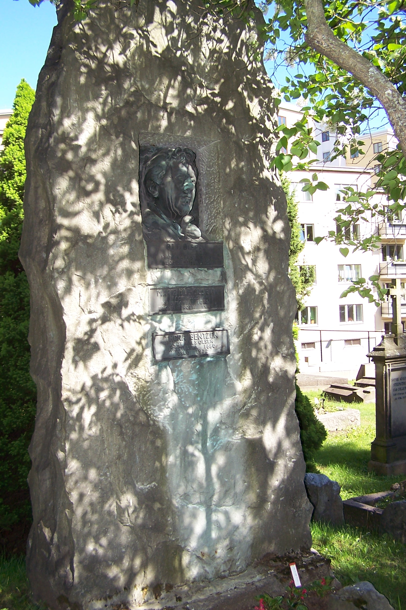 Tomb of Ole Olsen at Vår Frelsers gravlund, Oslo